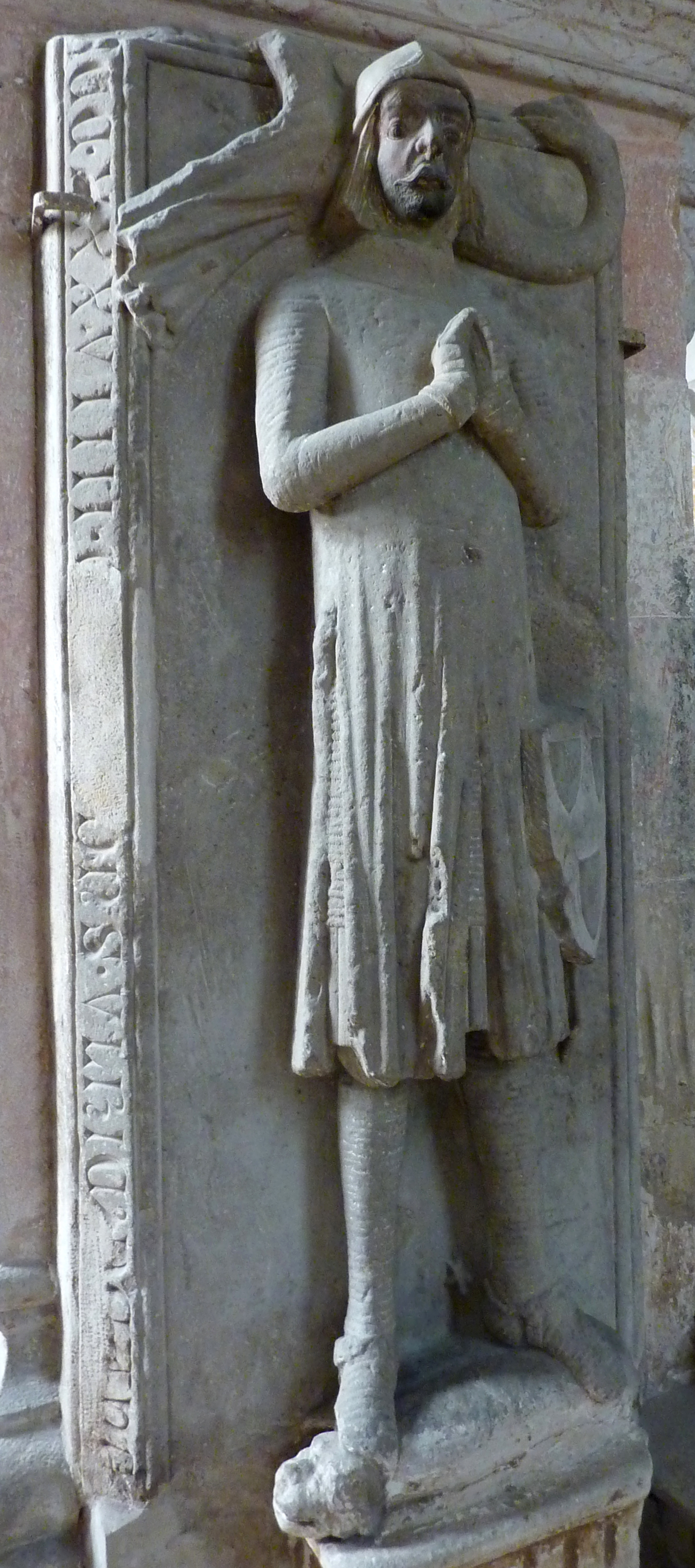 katholische Basilika St. Vitus in Ellwangen (Jagst), Epitaph für Ulrich von Ahelfingen († 1339)